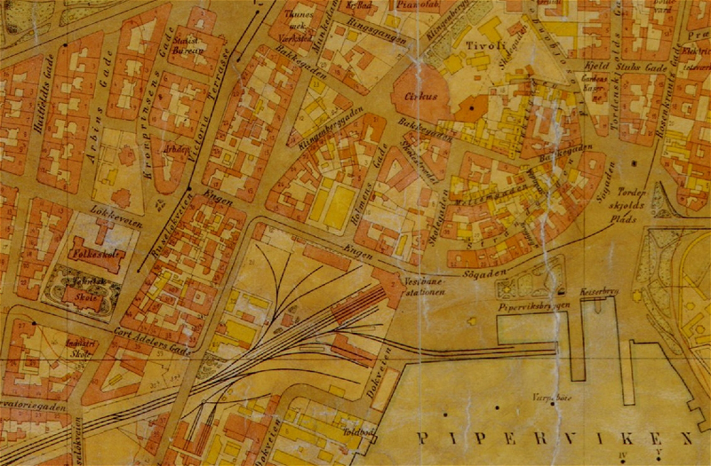 Kart over Kristiania